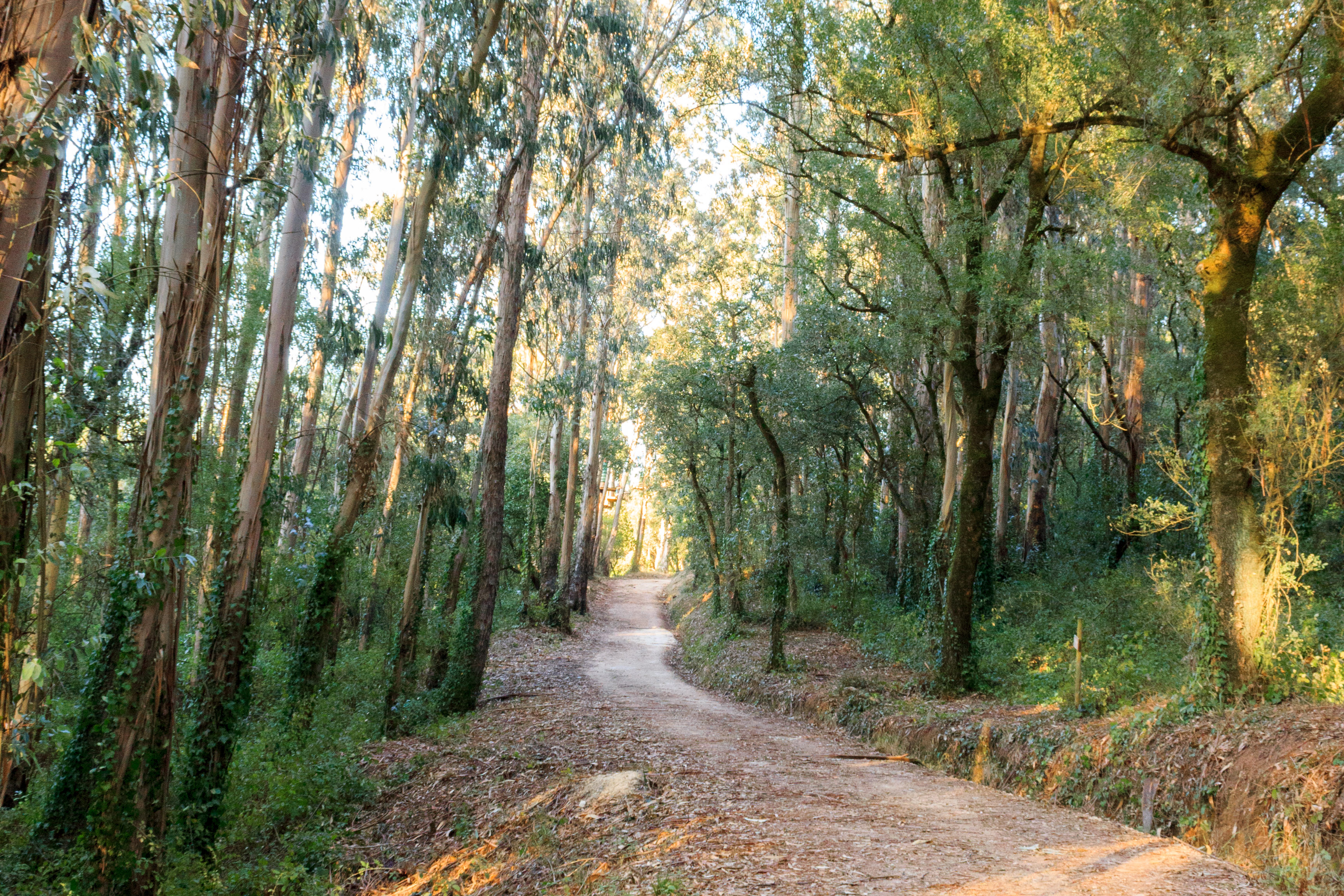 Área Florestal do Parque Municipal do Cabeço de Montachique.